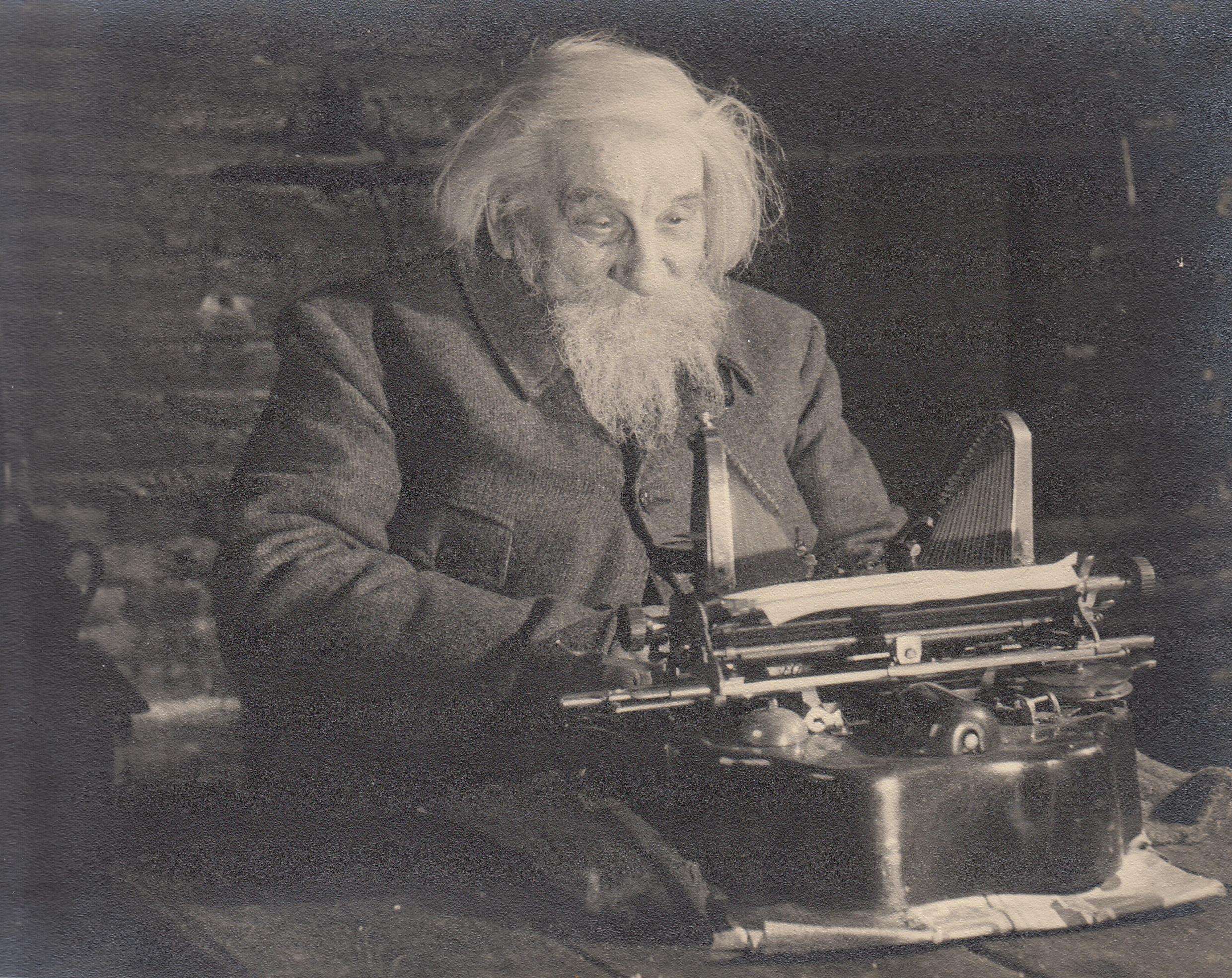 Philéas Lebesgue (1869-1958), chez lui, le 31 décembre 1949